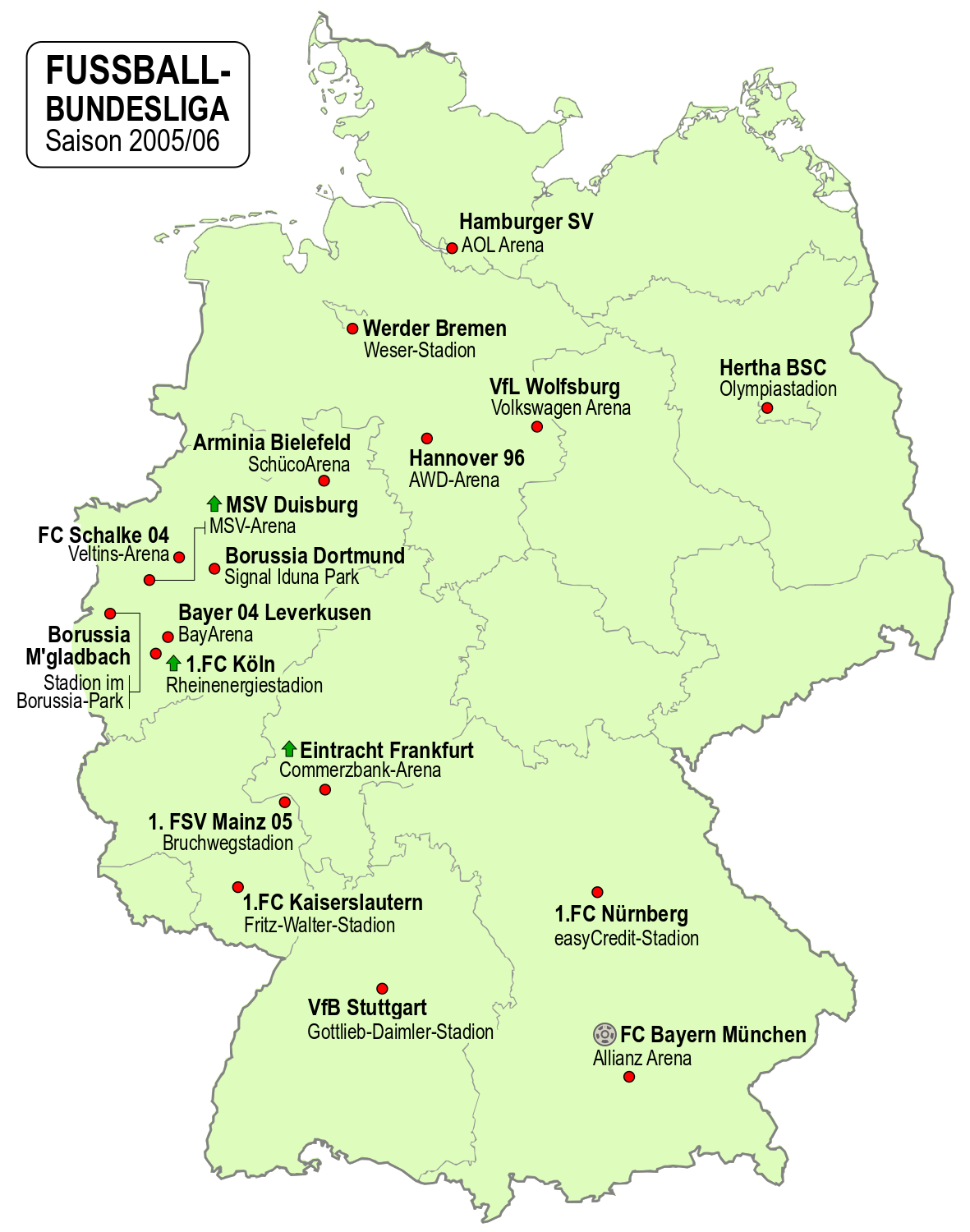 Karte der Vereine der Fussball-Bundesliga-Saison 2005/06